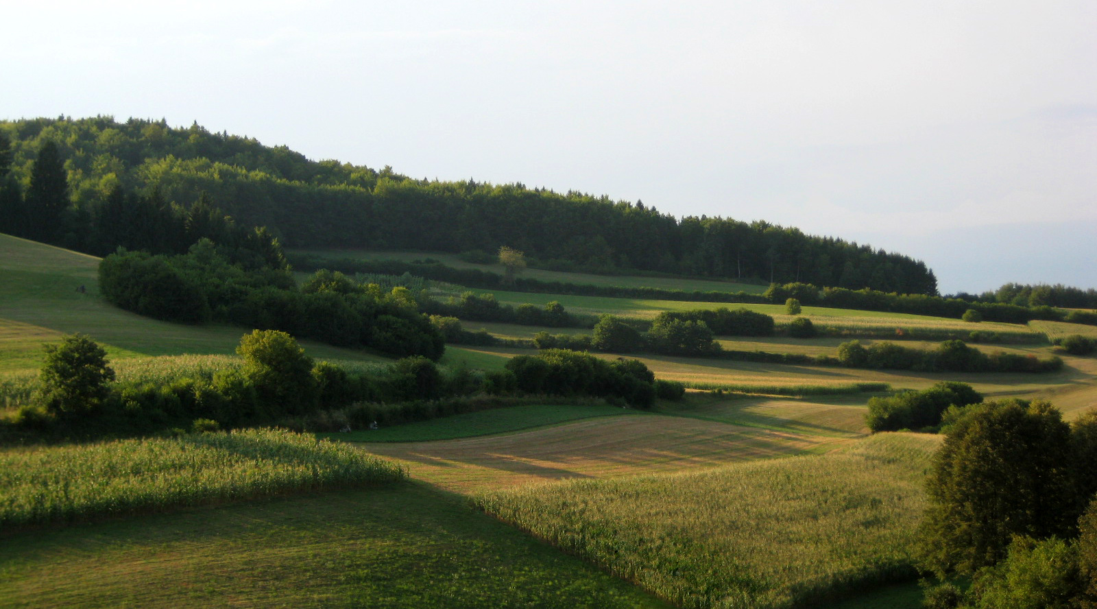 Fields at Suha krajina, Slovenia